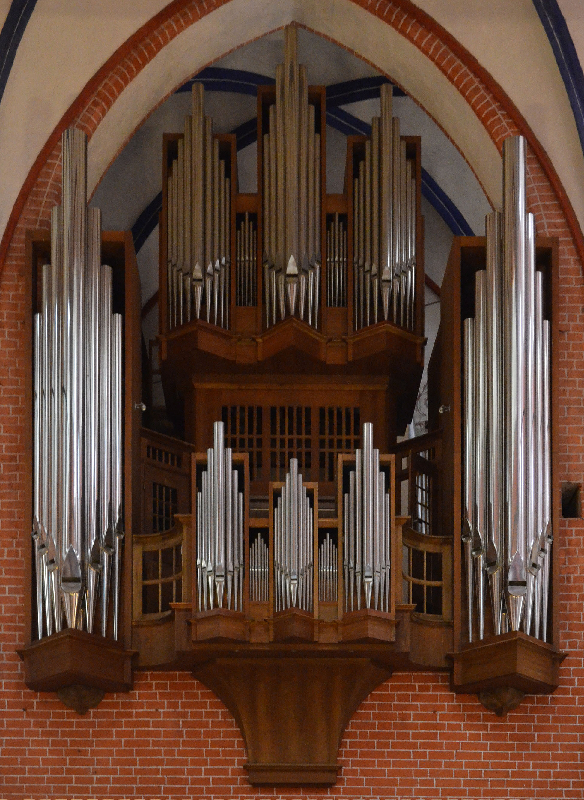 Bad Doberan, Münster, Orgel 7 (2)